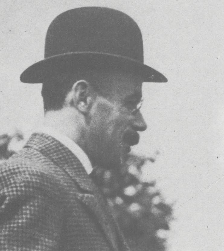 Александр Константинович Шервашидзе (Чачба)- Первый профессиональный абхазский художник, график, живописец, сценограф, общественный деятель.